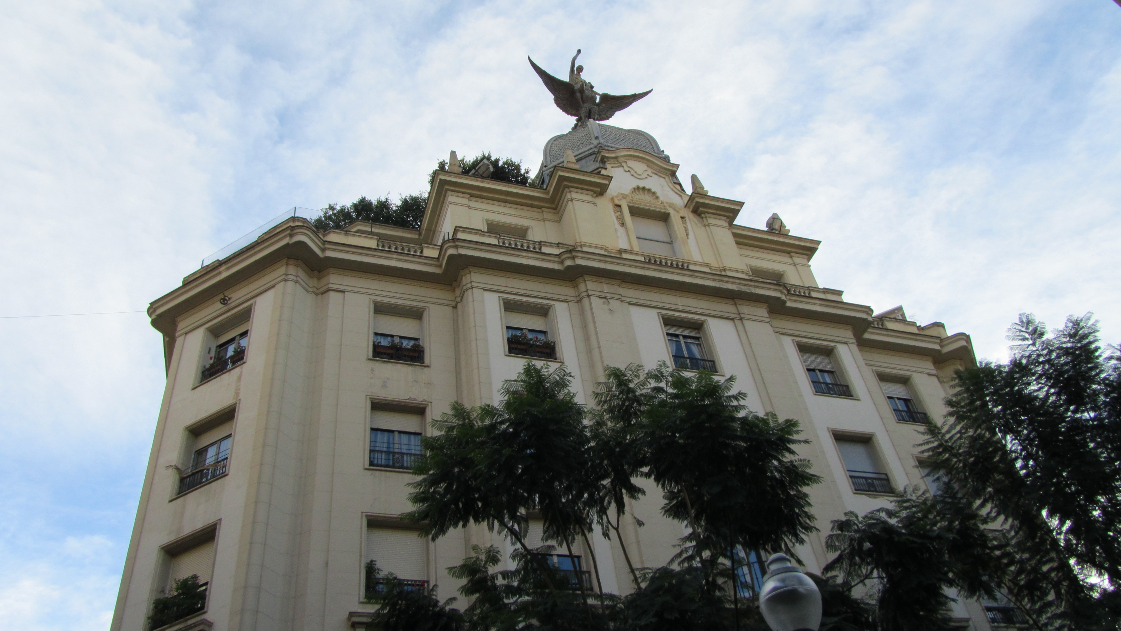 Edificio de la Unión y el Fénix de Murcia (España). Sito en la Plaza de Santa Catalina.